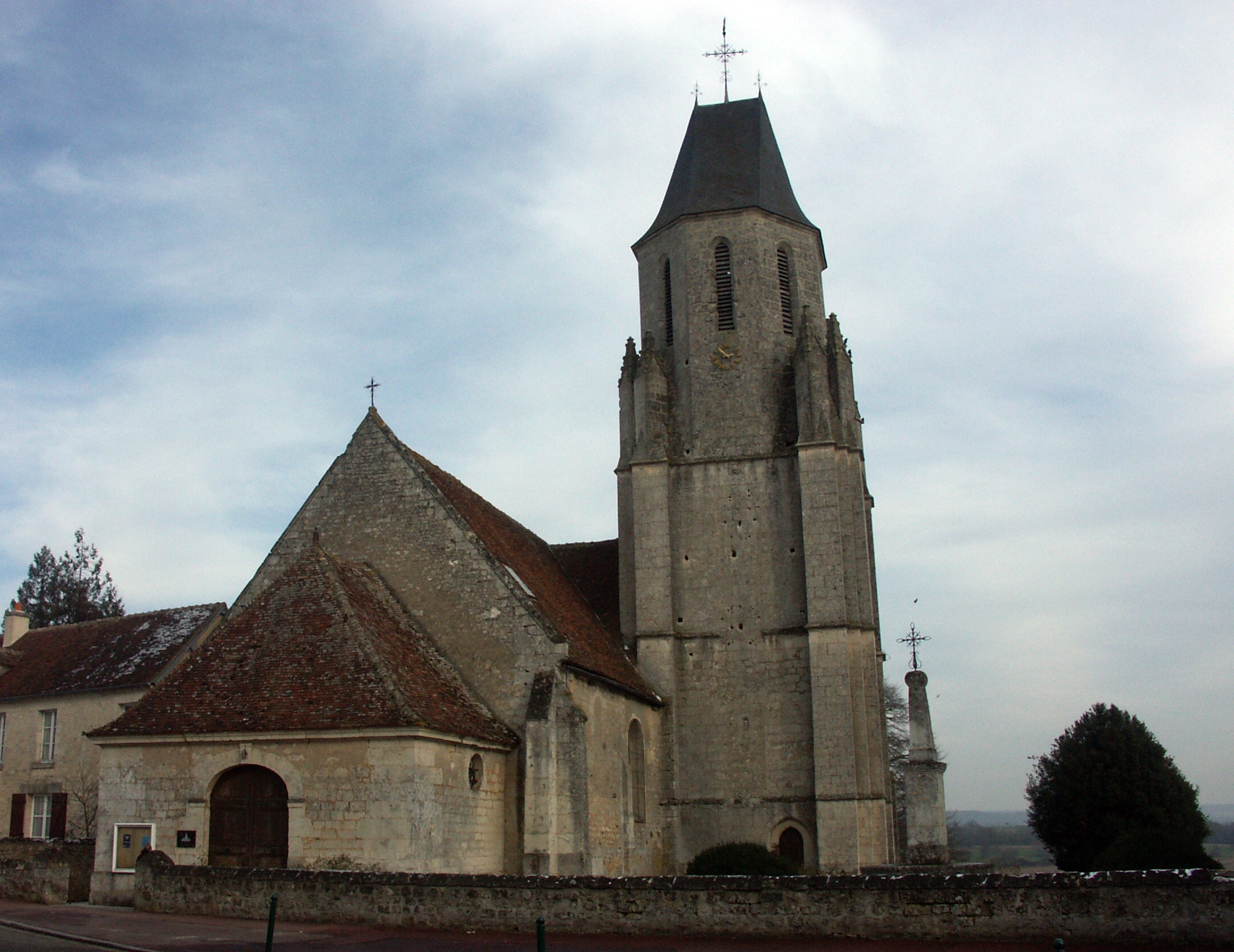 Nef 12e s, accolée au sud tour-clocher 13e S à deux étages carrés et troisième étage octogonal, chapitrel accolé à la façade ouest. ISMH 1975. .